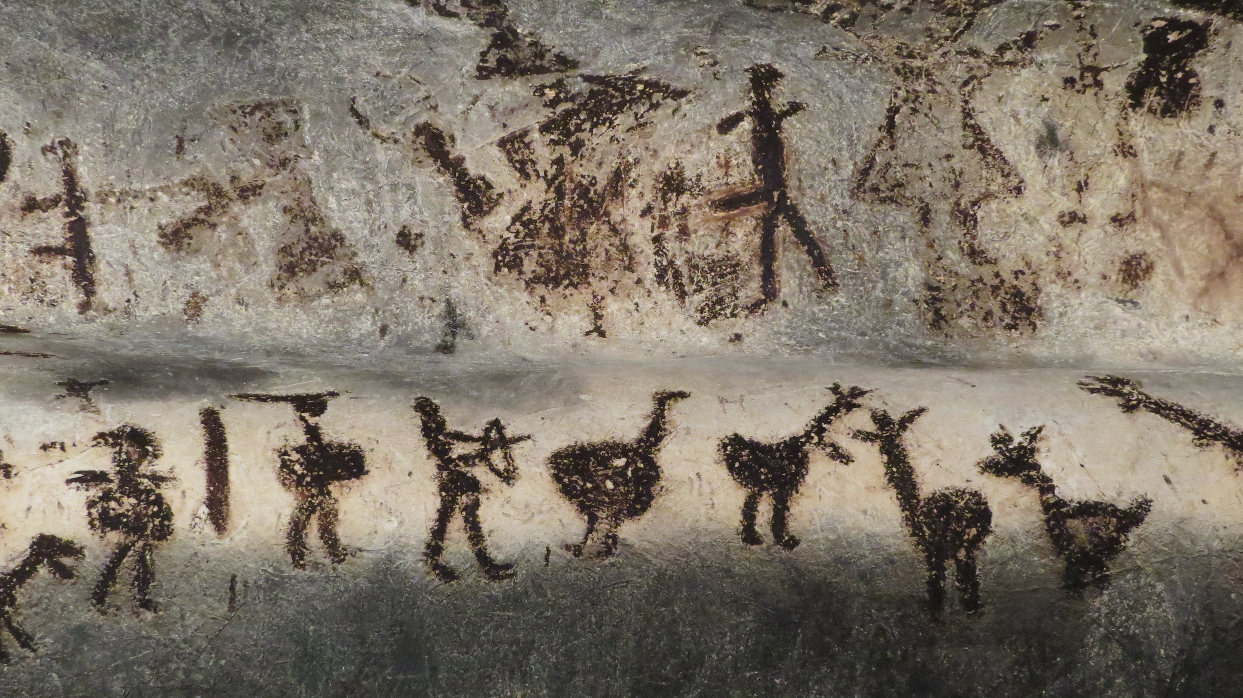 Jama Magura: lovski prizor.